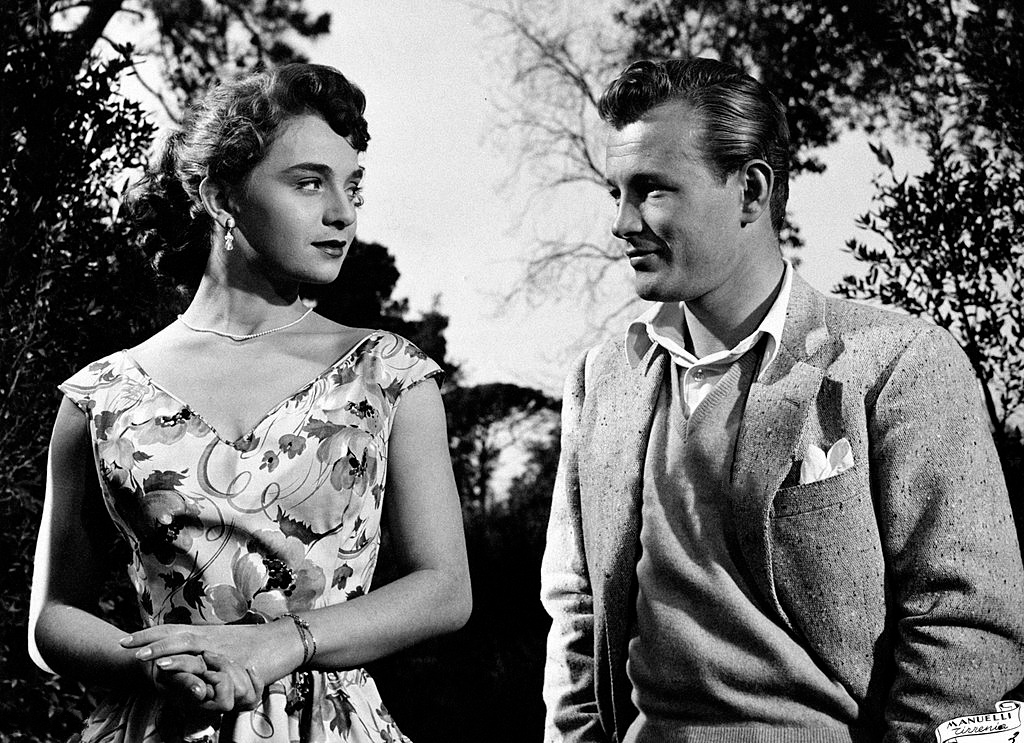 Brunella Bovo and Jacques Sernas stroll in a scene from the movie Dieci canzoni d'amore da salvare. Italy, 1953